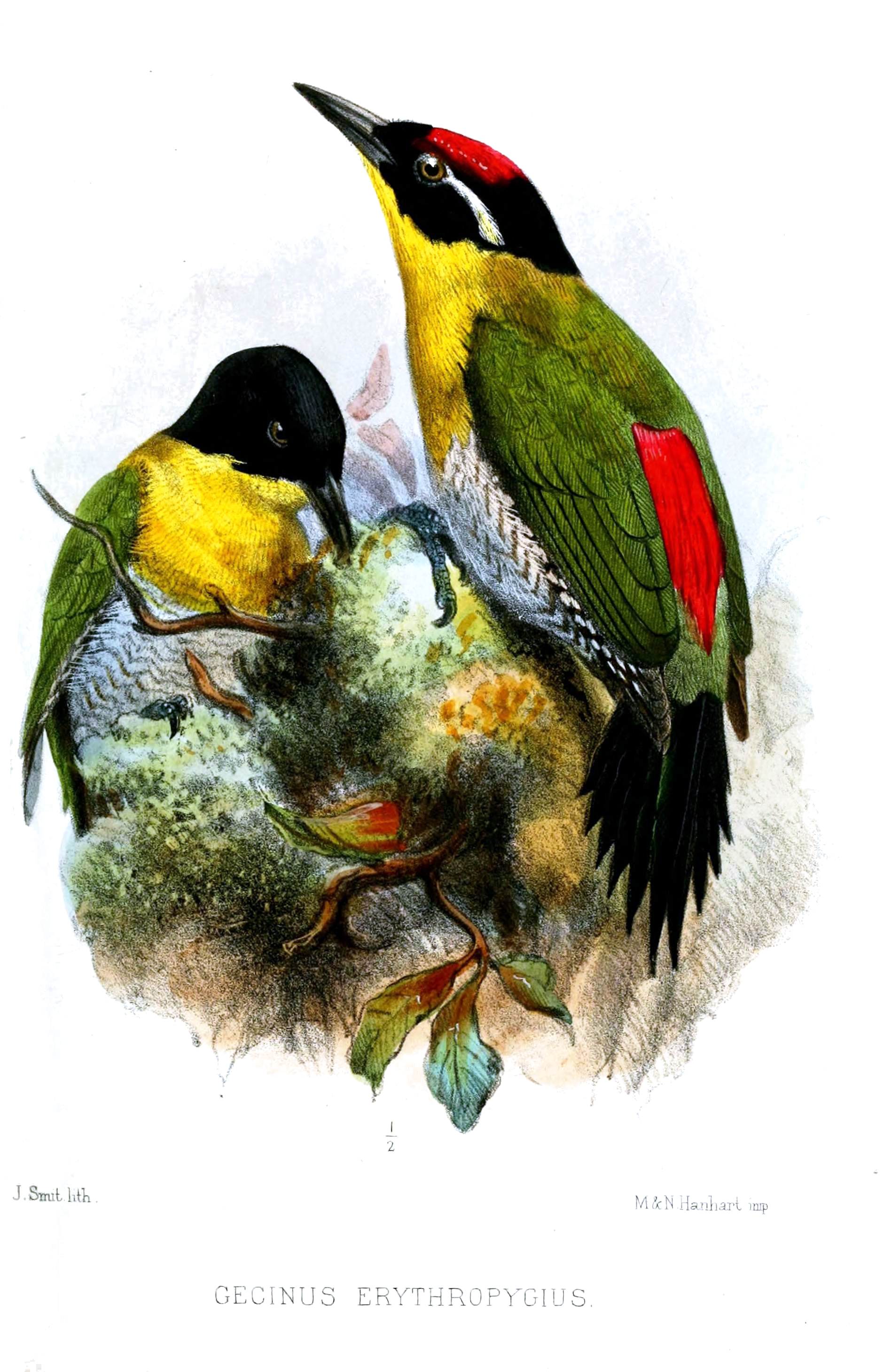 Gecinus erythropygius = Picus erythropygius